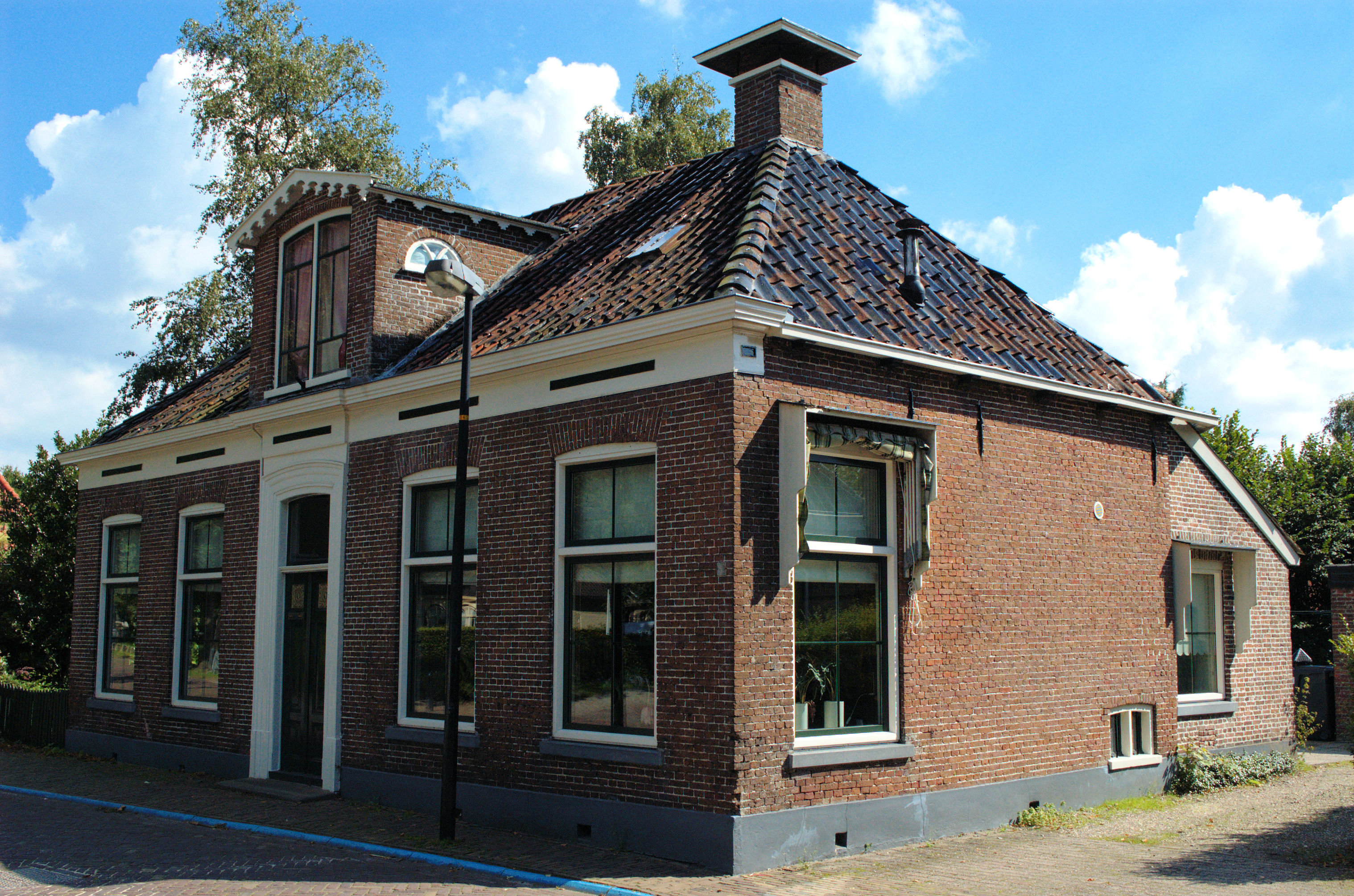 woonhuis Schoolstraat 86, Burgum